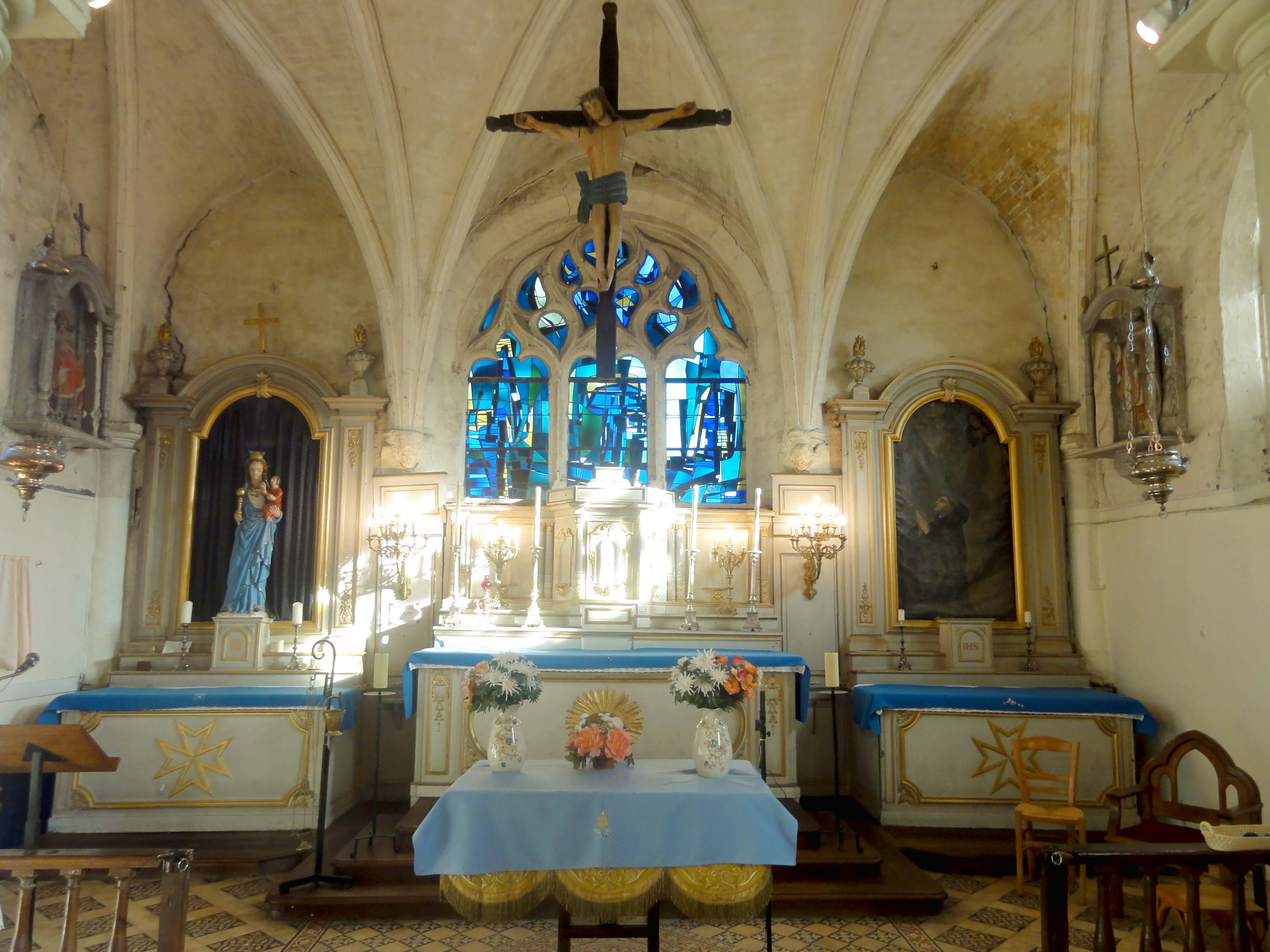 Intérieur, vue vers l'est.